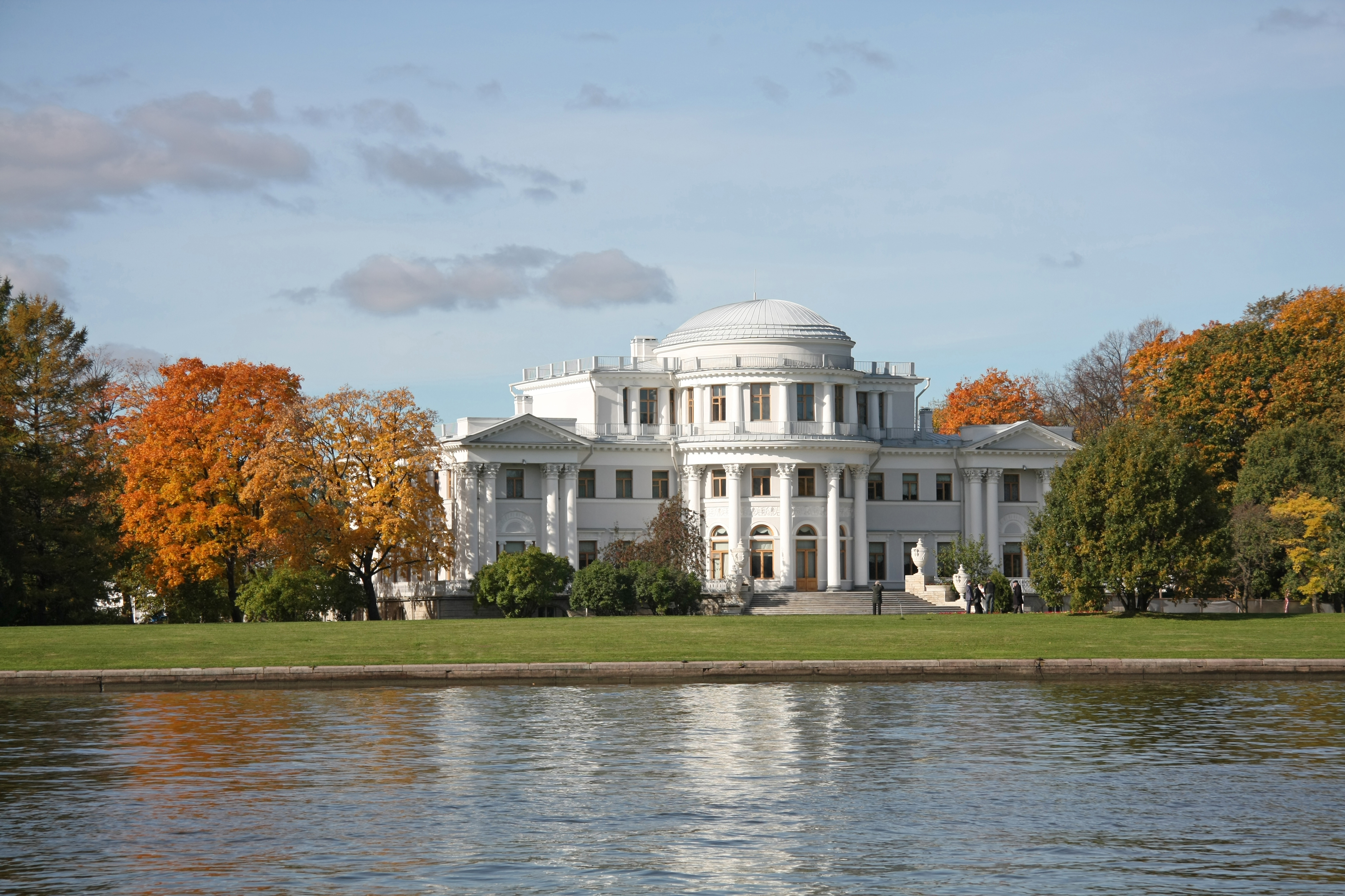 Елагин дворец: Елагин остров, 4, Петроградский район, Санкт-Петербург